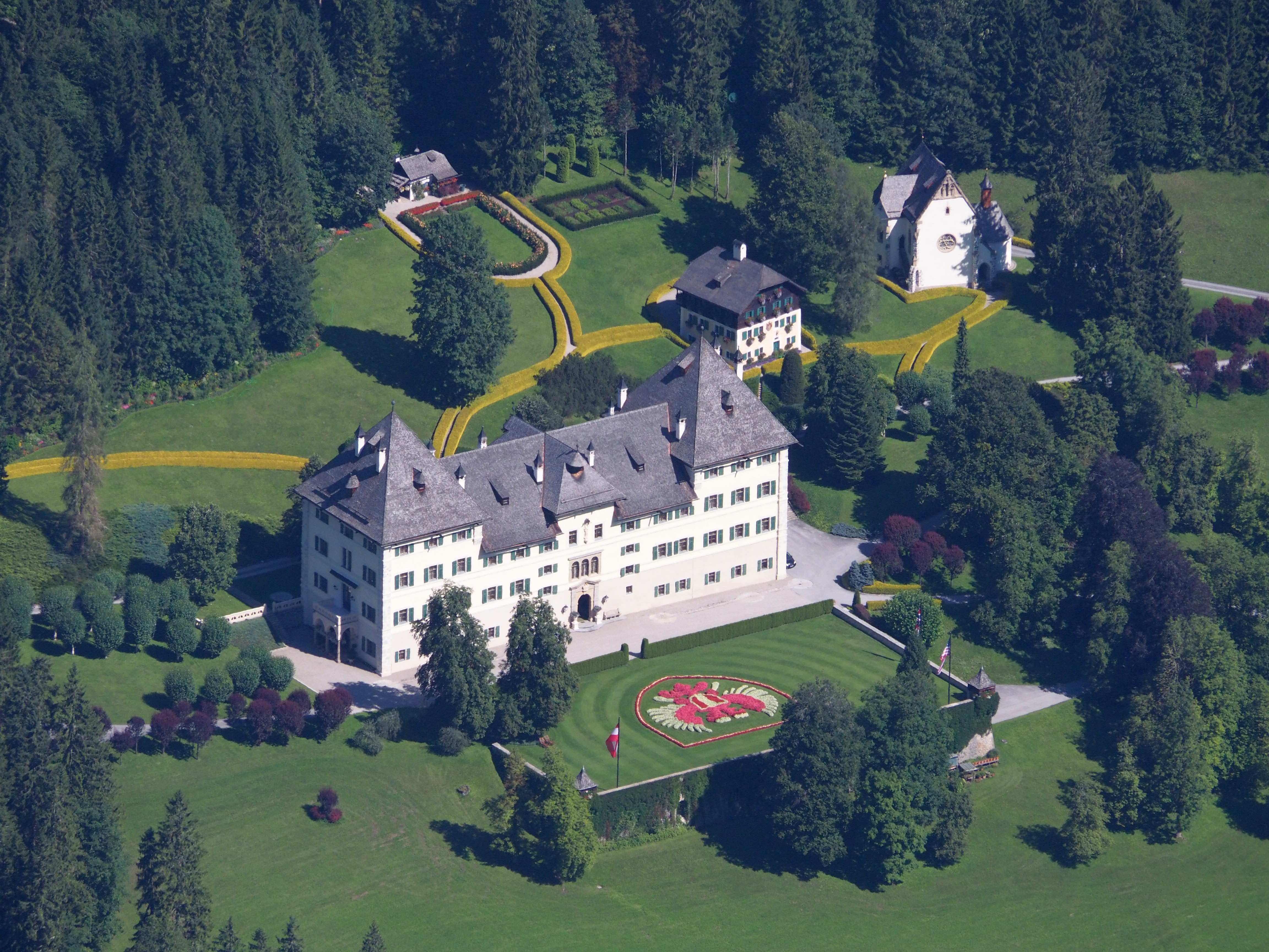 Schloss Blühnbach von Süden (Rettenbachriedel). Rechts hinten die Kapelle Hll. Familie und Rupert.